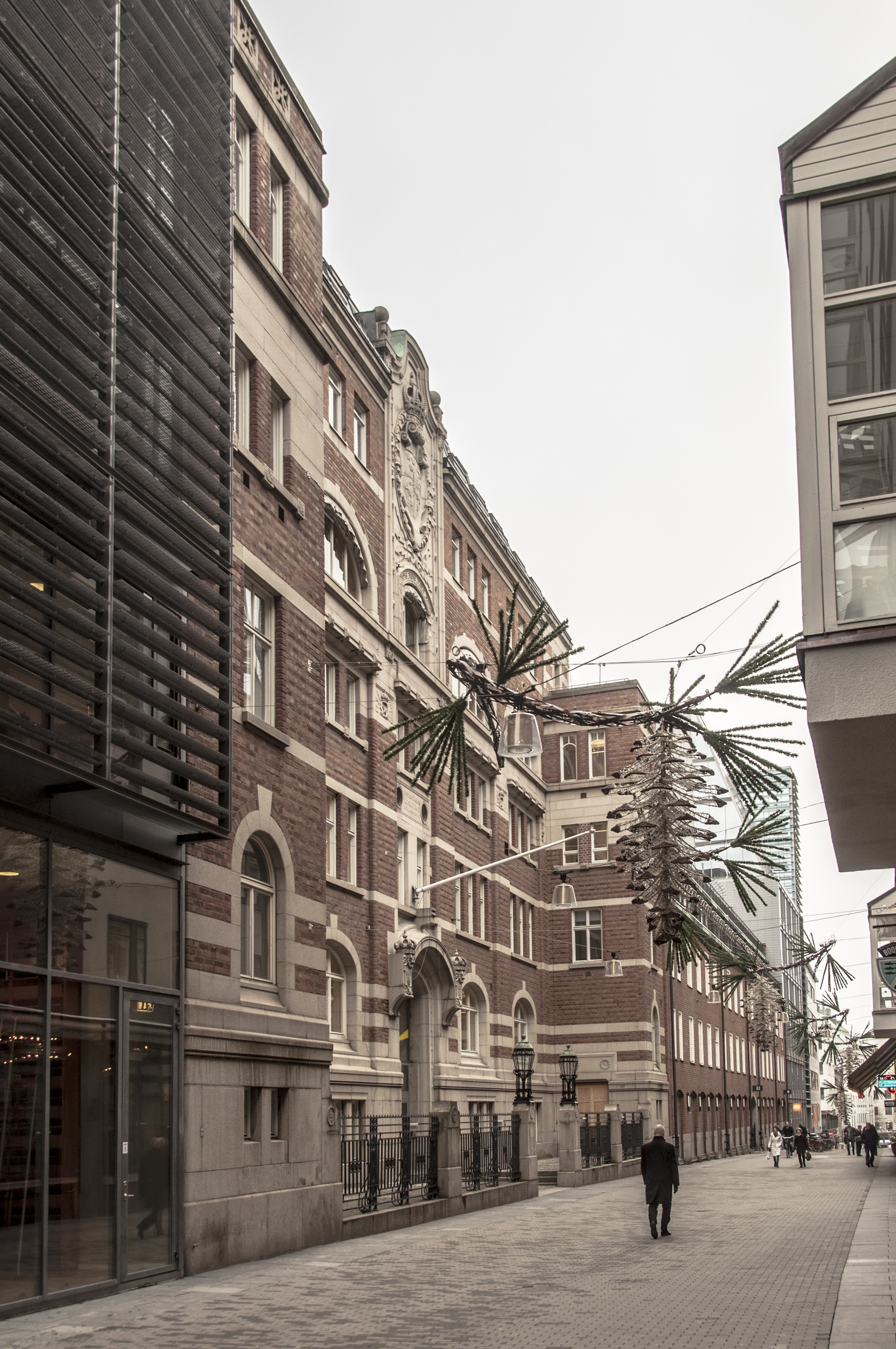 Televerkets hus, Jakobsbergsgatan